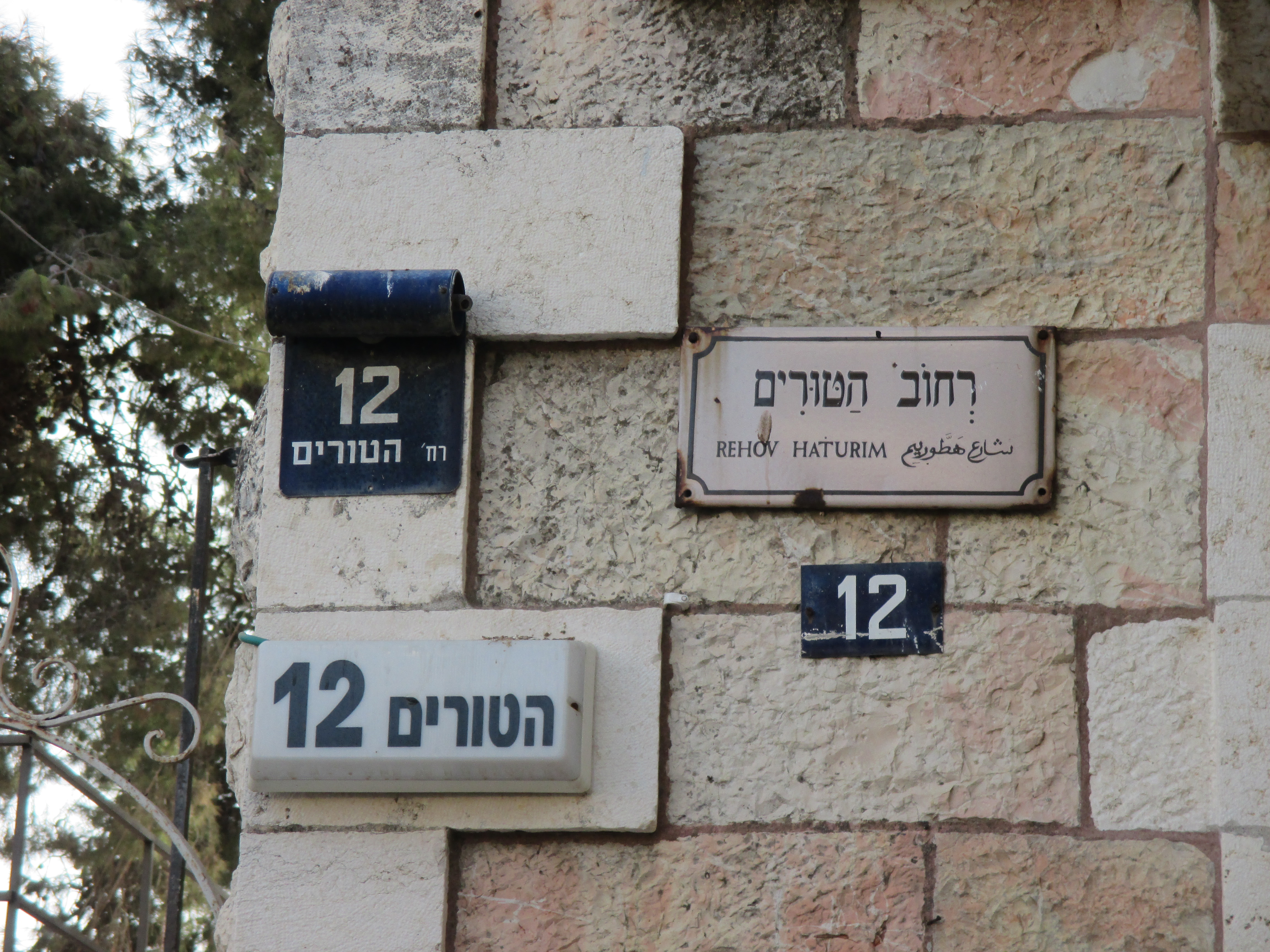 שלט רחוב הטורים בירושלים